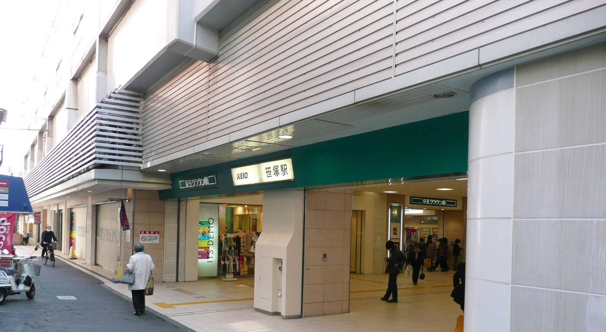 笹塚駅北口